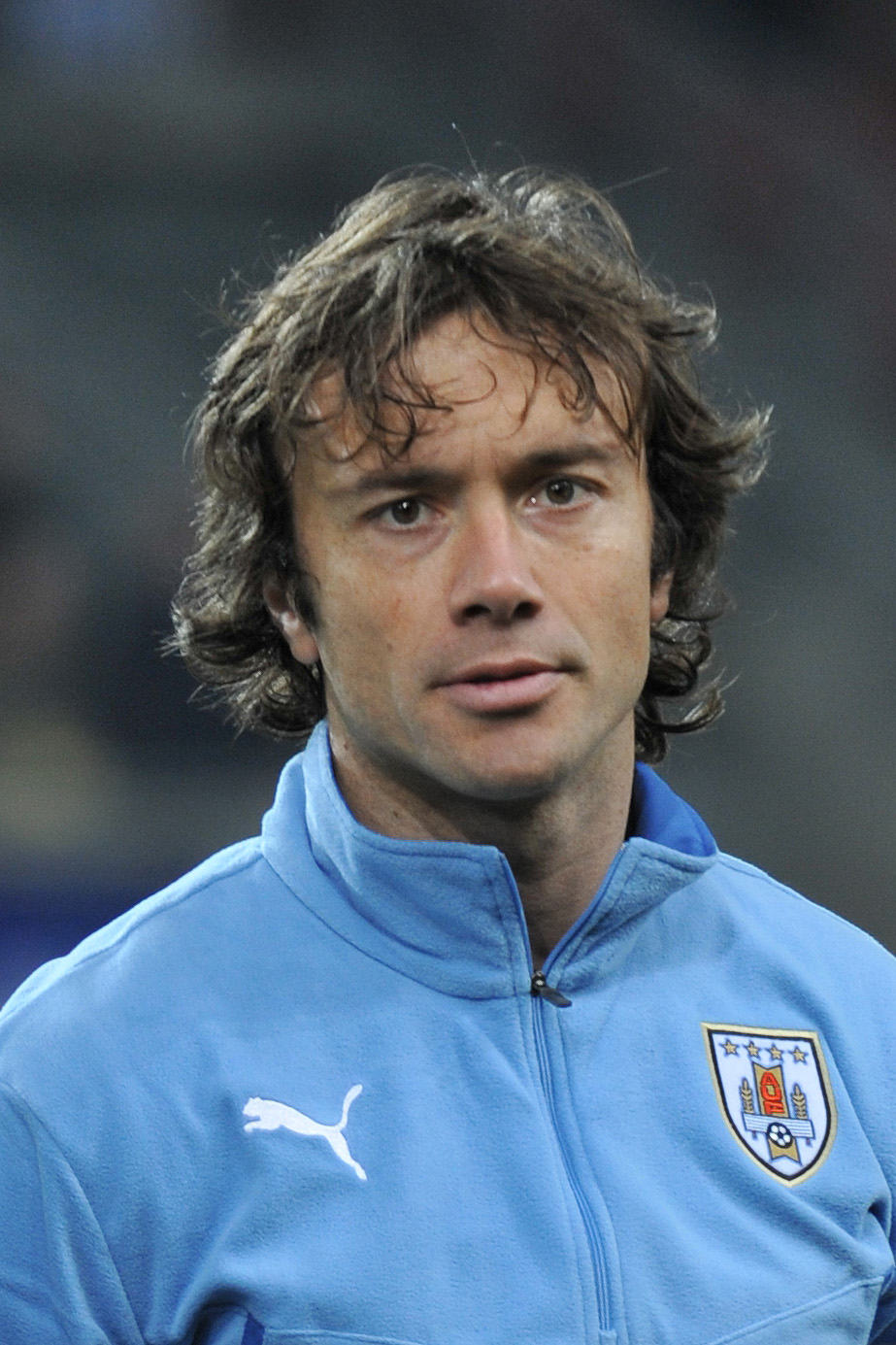 Freundschaftliches Länderspiel Österreich - Uruguay am 5. März 2014 in Klagenfurt: Diego Lugano